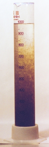 Disperse Separation vom Schlamm in einem Standzylinder.